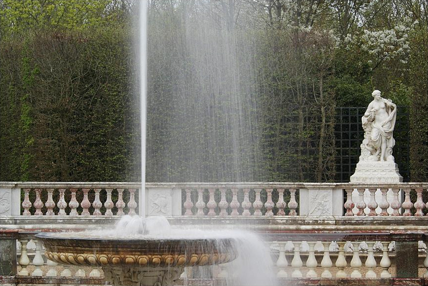 Grandes-Eaux d'avril 2009 - Petit Parc du Château de Versailles - Bosquet des Dômes Removed watermark: Jérémy Flavien Hubert